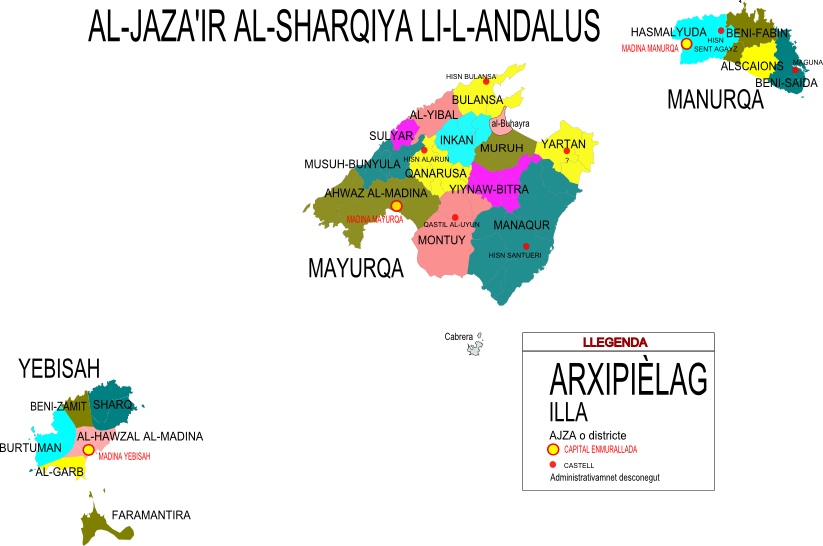 Geografia política de les Illes Balears durant el periode musulmà. Fonts consultades: Atles de les Illes Balears, Diafora, 1979, Atles geogràfic i històric de les Illes Balears, Govern de les Illes Balears, 2008 i Mallorca Musulmana, Guillem Rosselló, UIB 2008.